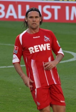 Maniche, 1. FC Köln 1-3 Vfl Wolfsburg, Köln August 08 2009